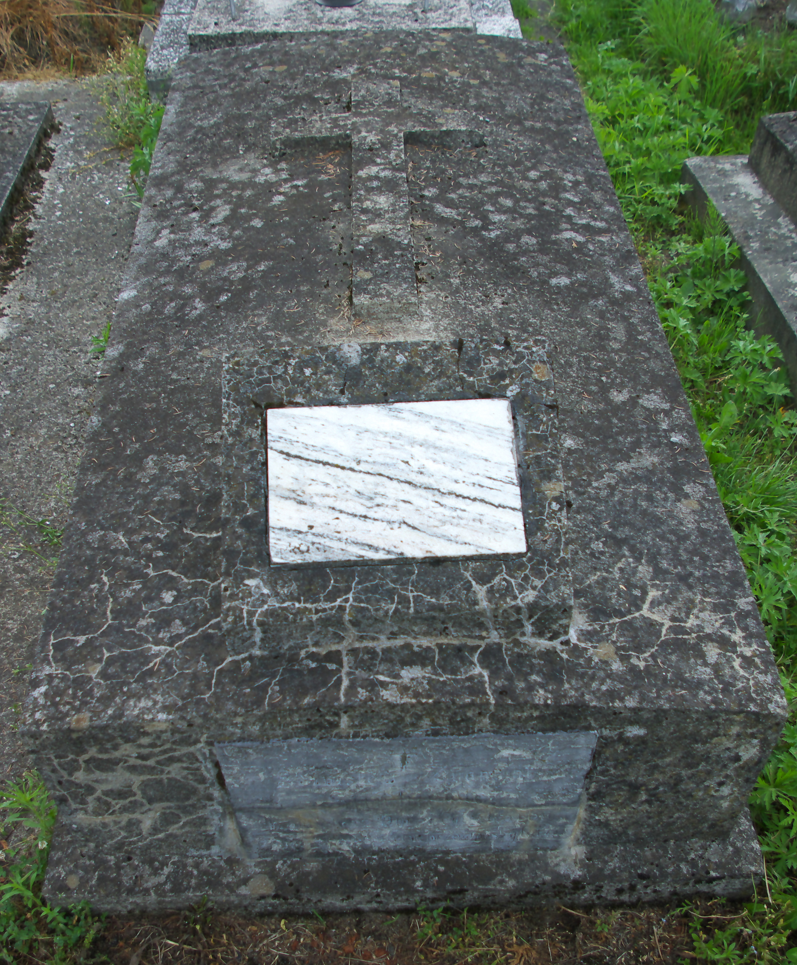 Nagrobek Stanisława Zygmunta Stachiewicza (zm. 17 IX 1917) i Rozalii Sałabaj (23 XI 1987) na Cmentarzu Centralnym w Sanoku.